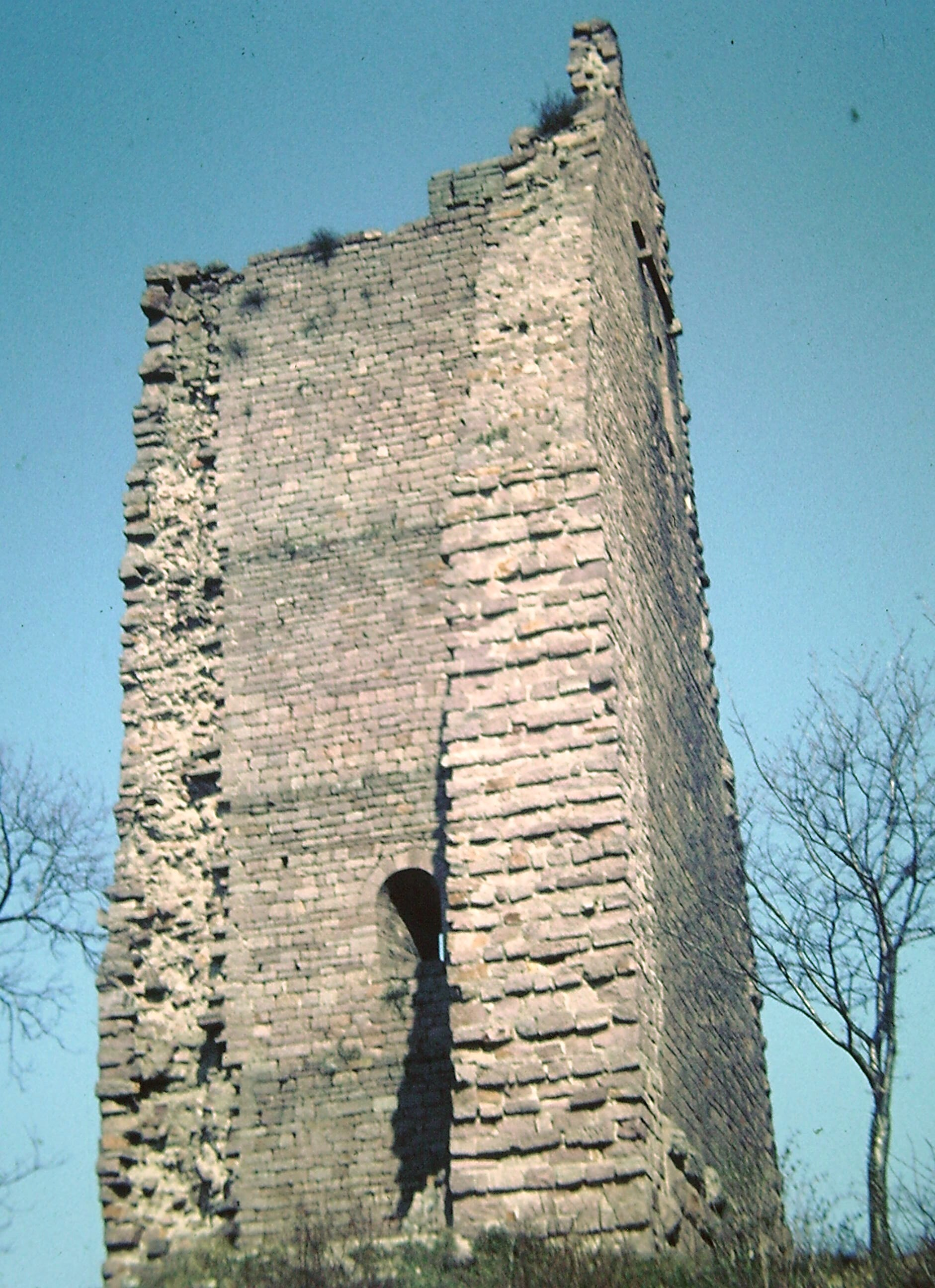 Haut Eguisheim - Château de Dagsbourg, le donjon